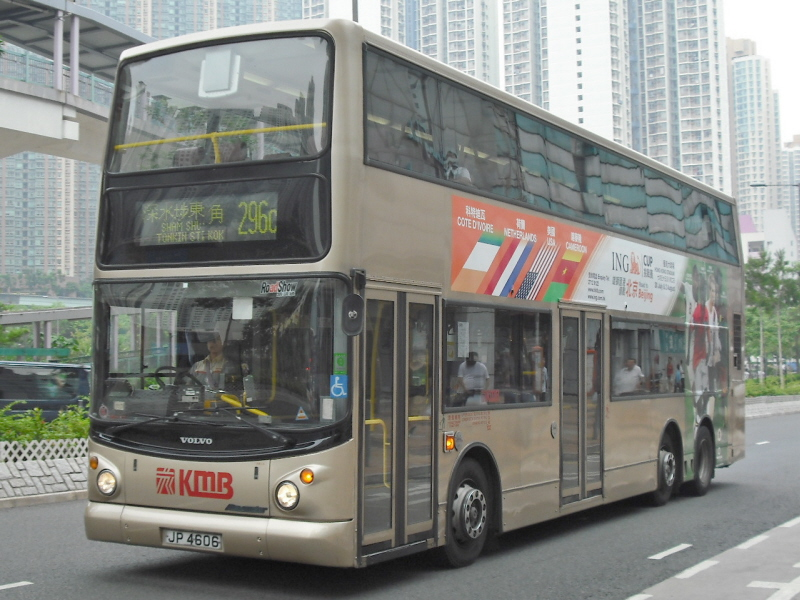 中文（香港）: 九巴296C線巴士，攝於將軍澳尚德商場對面的巴士站。